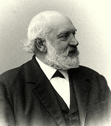 Porträt August Tonnar als 75-Jähriger